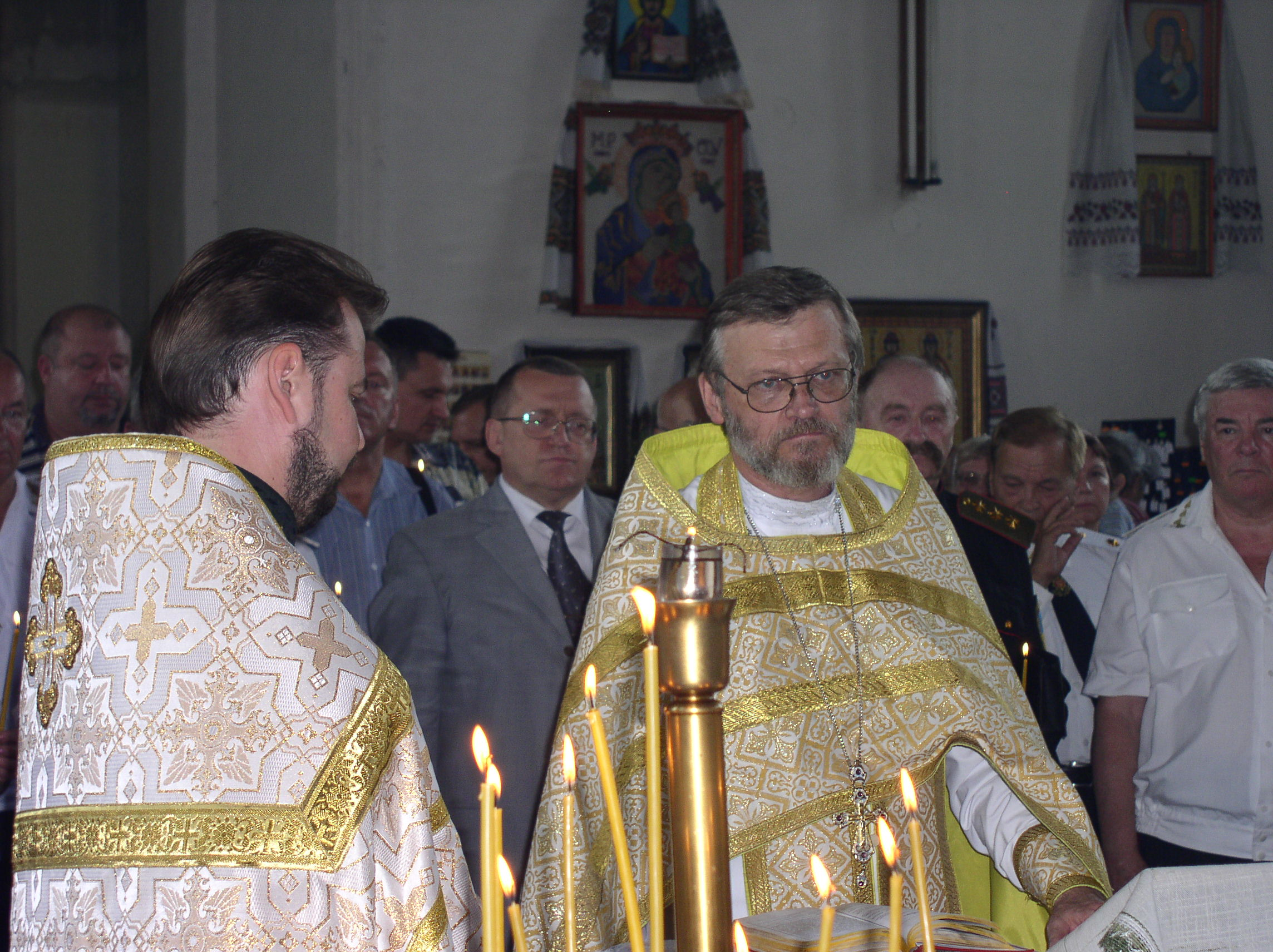 Молитва за гетмана Мазепу,церква Иоанна Богослова, Харьков, 2007 год